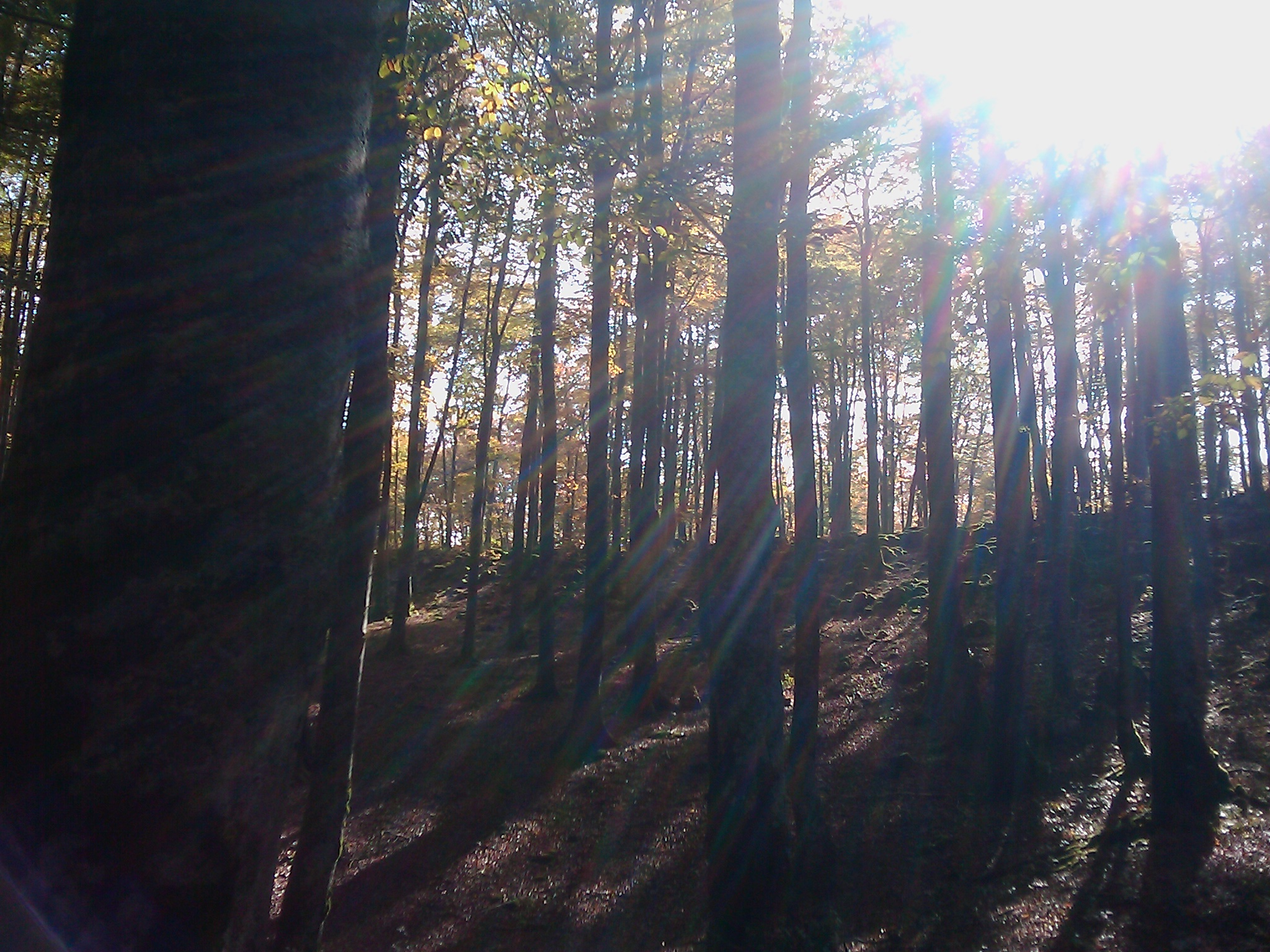 Eguzki errainuak basoan